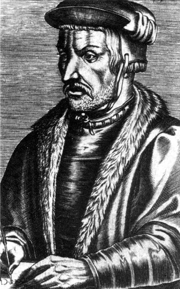 Porträt des Universalgelehrten Heinrich Cornelius Agrippa von Nettesheim